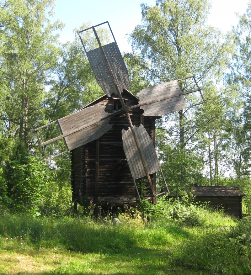 Tuulimylly Hakamäen museoalueella Savitaipaleella